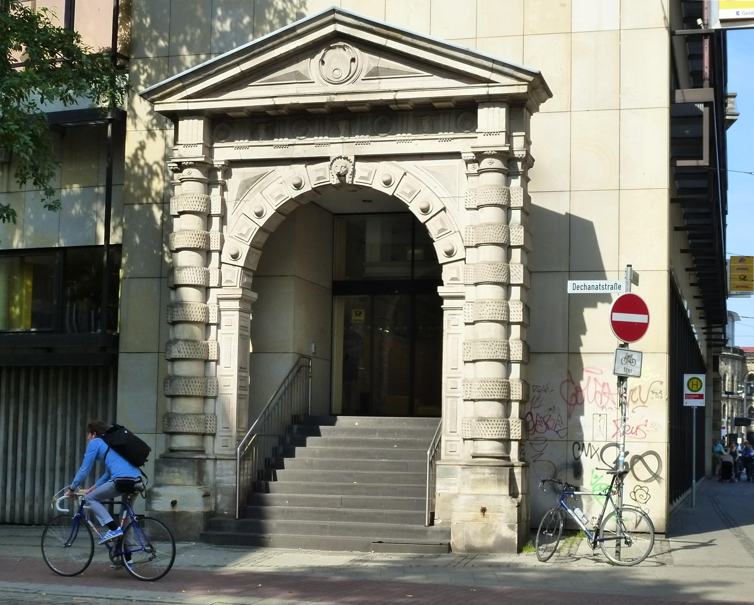 Kaiserliche Oberpostdirektion in Bremen, Domsheide 15: Portal vom Eschenhof aus dem 16. Jahrhundert an der Dechanatstraße.Das abgebildete Objekt ist ein geschütztes Kulturdenkmal in der Freien Hansestadt Bremen, mit der Nr. 0316 beim Landesamt für Denkmalpflege registriert.